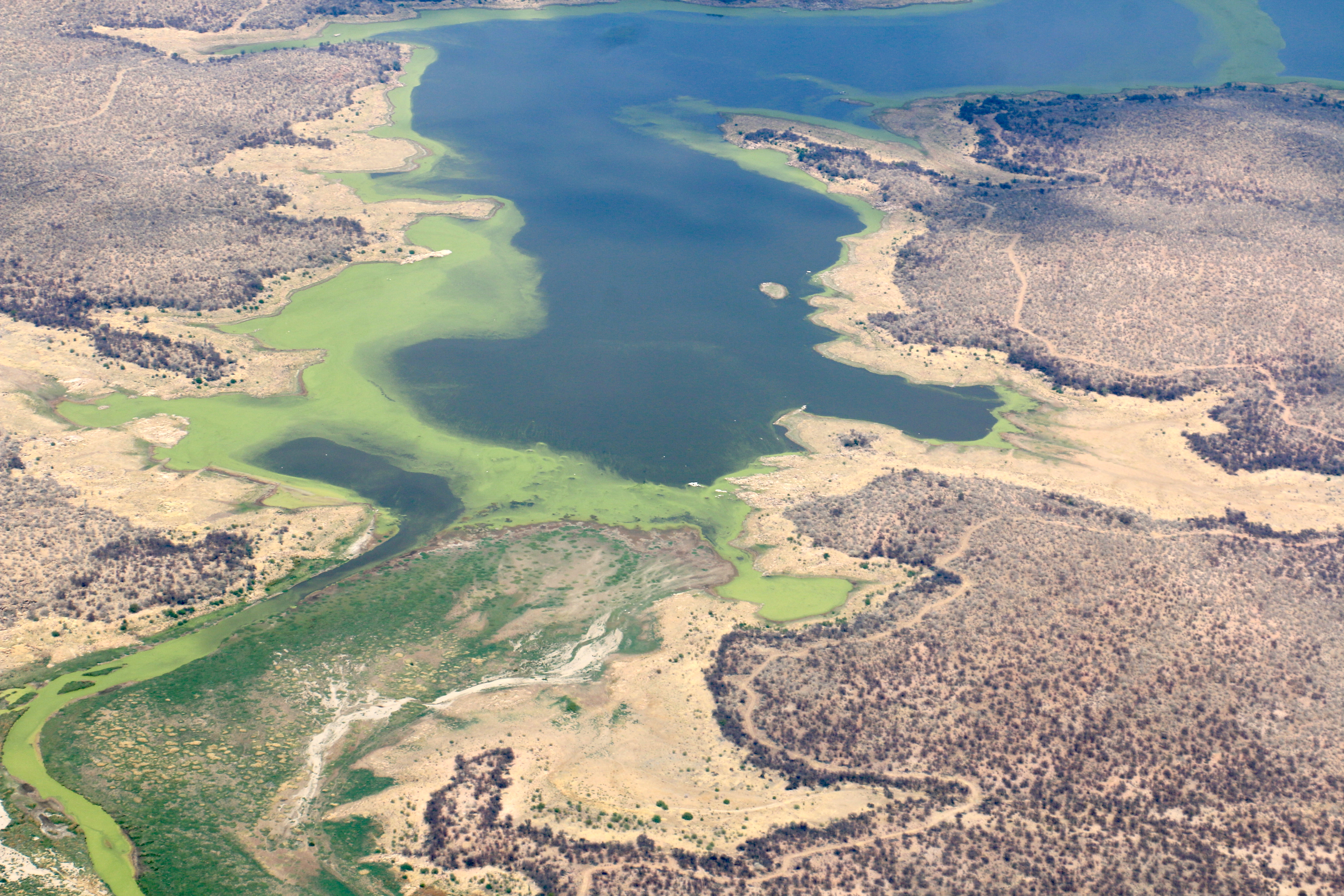 Swakoppforte-Damm (2017)